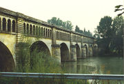 propre photo - Béziers (Hérault) - pont-canal permettant au Canal du Midi de franchir l'Orb.